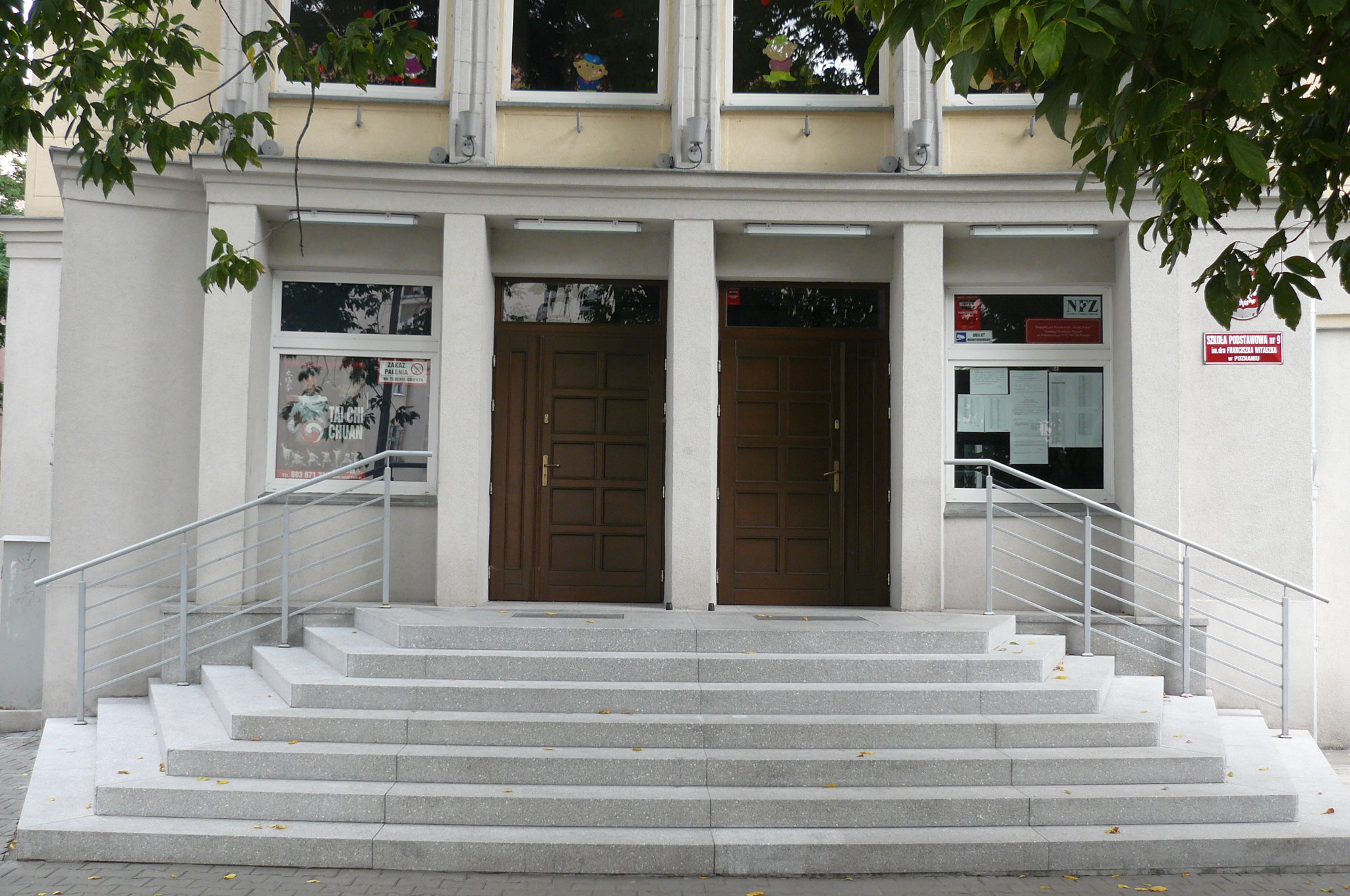 Szkoła przy ul. Łukaszewicza w Poznaniu.